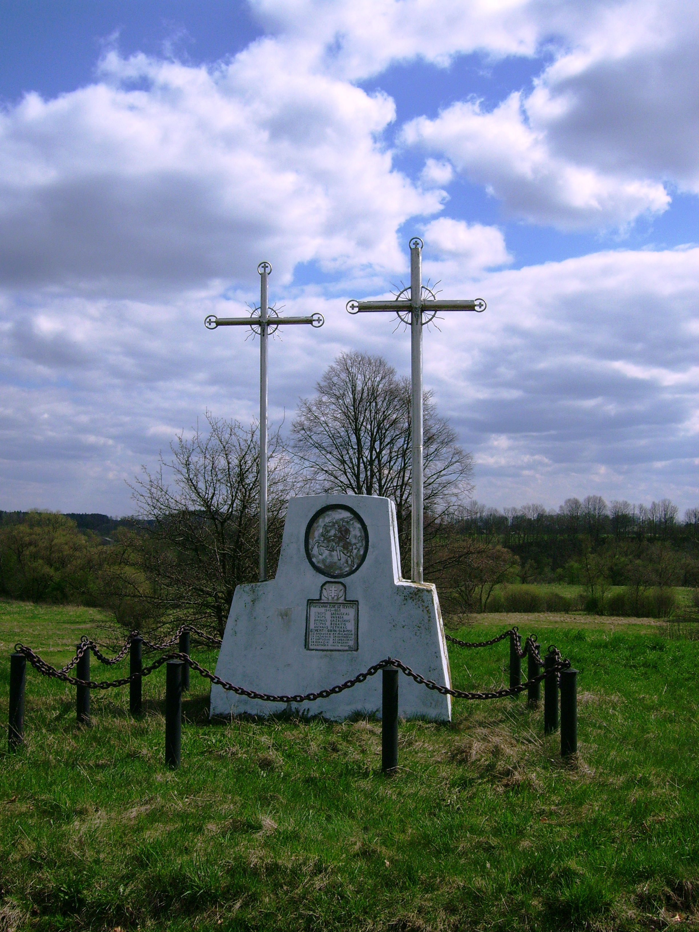 Paminklas partizanams Rekstukuose